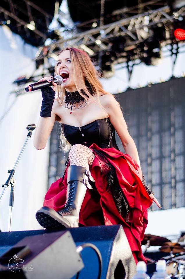 Nightwish, jún 2016, Košice